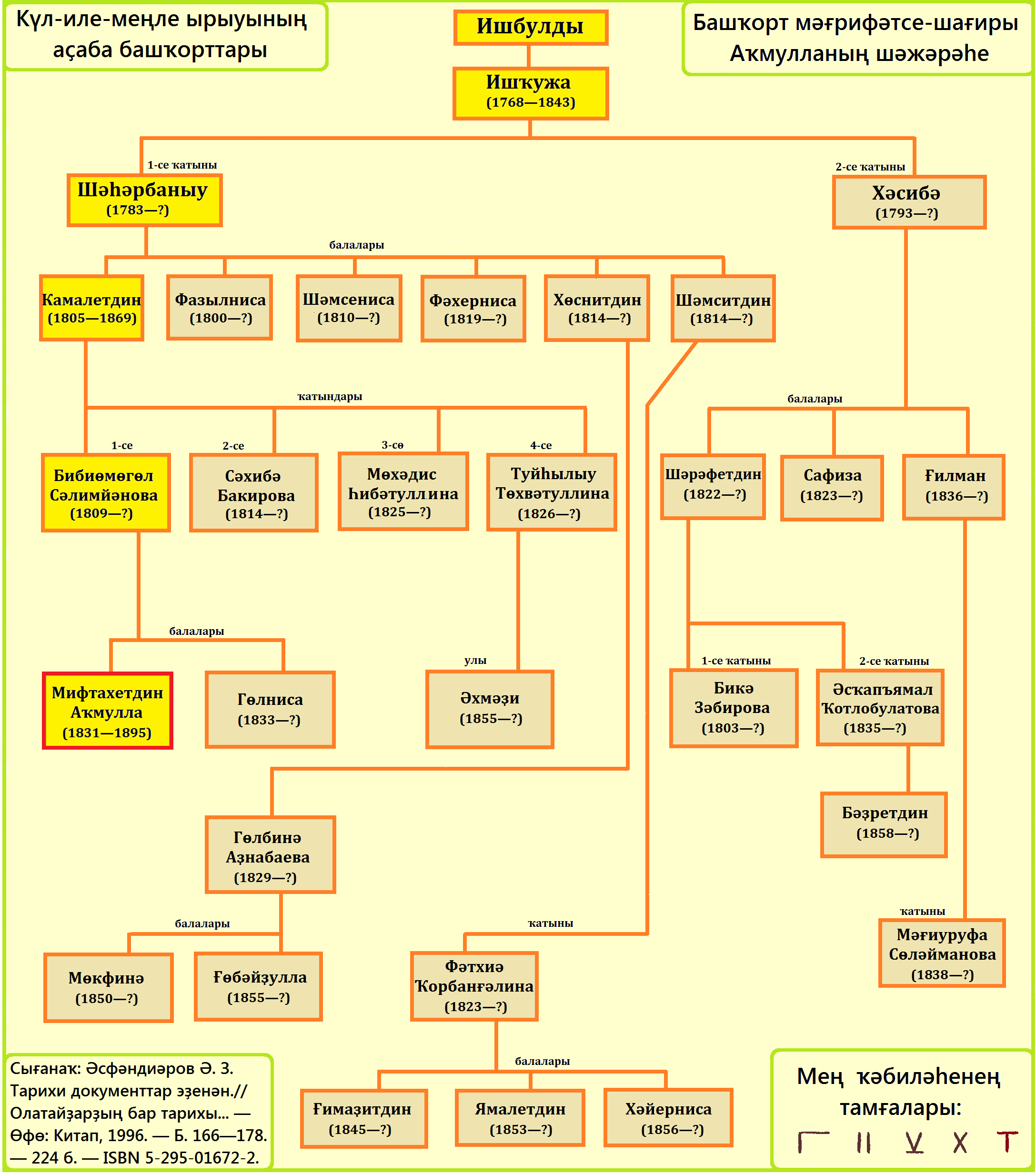 Родословная башкирского поэта-просветителя М. Акмуллы (1831—1895) Башҡортса: Башҡорт мәғрифәтсе-шағиры М. Аҡмулланың (1831—1895) шәжәрәһе